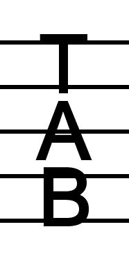 Notenschlüssel